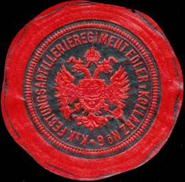 Sealing stamp Title: K.u.K. Festungsartillerieregiment Edler von Kollarz No. 6 Description: rot, schwarz, geprägt Place: size: 4 cm